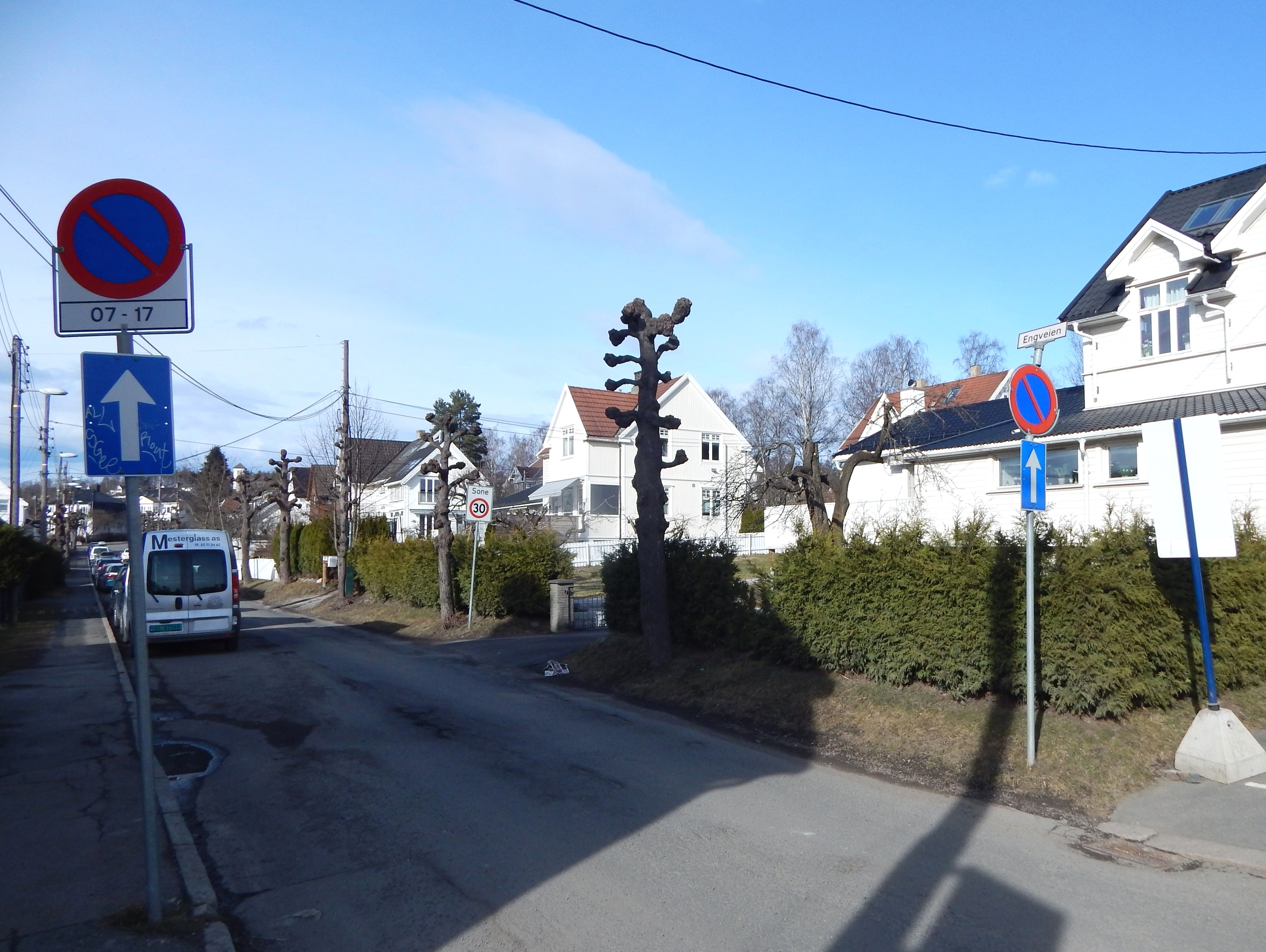 Engveien nord for Grefsenveien